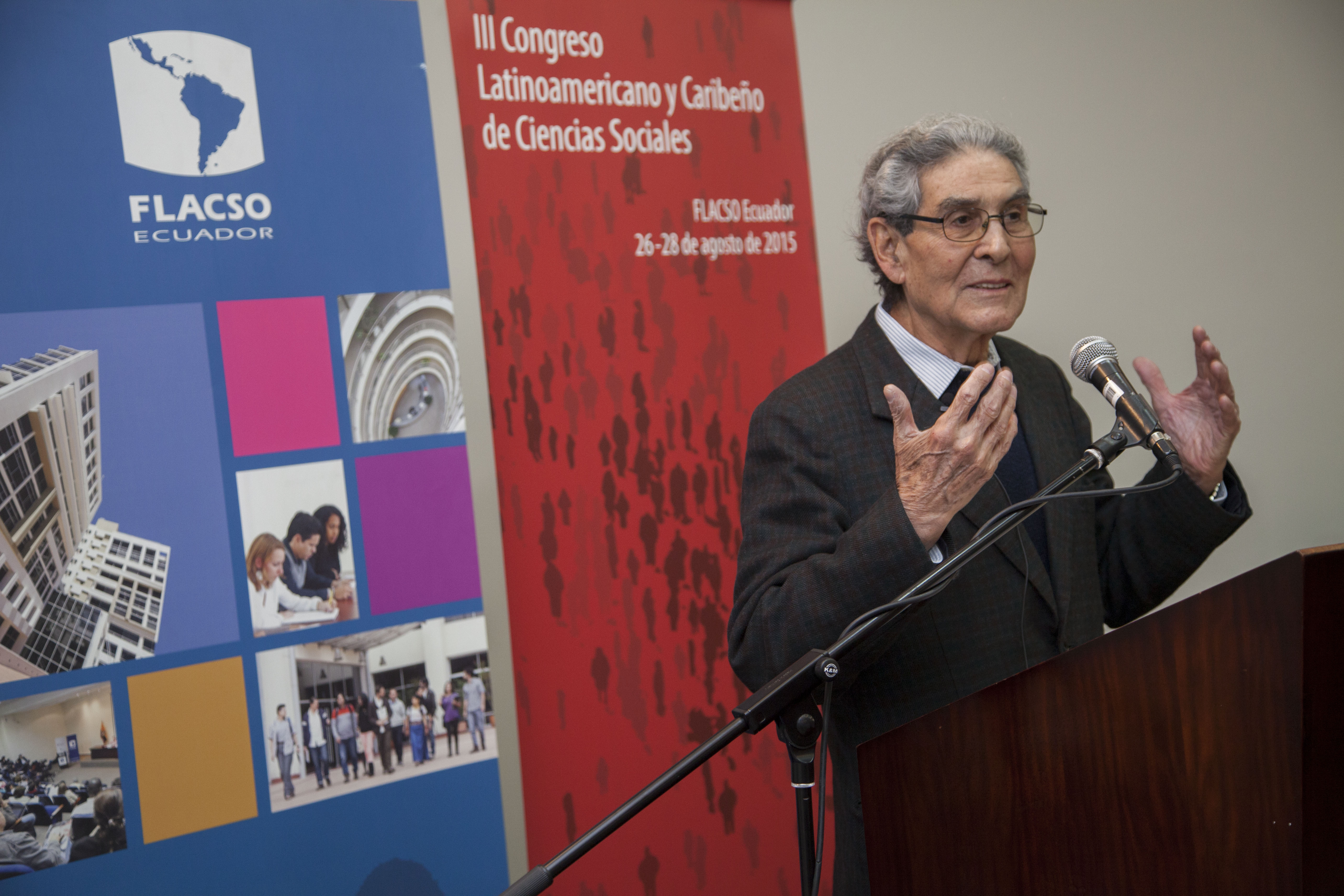 Quito, Ecuador. 25 de agosto de 2015. El Canciller Subrogante, Xavier Lasso inaugura el III Congreso Latinoamericano y Caribeño de Ciencias Sociales, que se realiza en Quito en las instalaciones de FLACSO Ecuador, como parte de la evento se destaca la ponencia magistral del Sociólogo Peruano, Aníbal Quijano. Carlos Pozo / Cancillería Ecuador